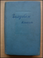 Zoschenko. Blue Book. 1935